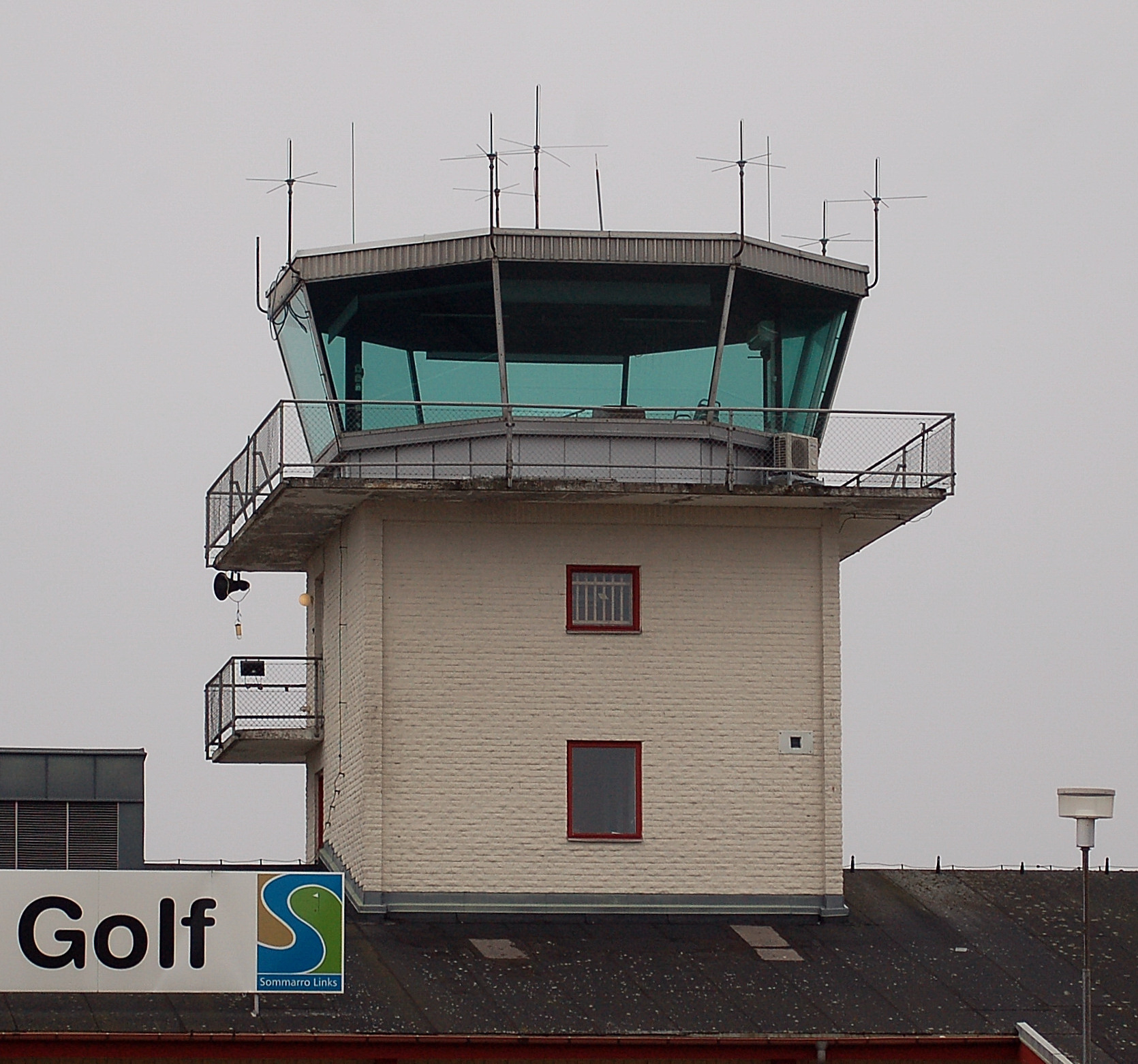 Flygledartornet vid Karlstad gamla flygplats.